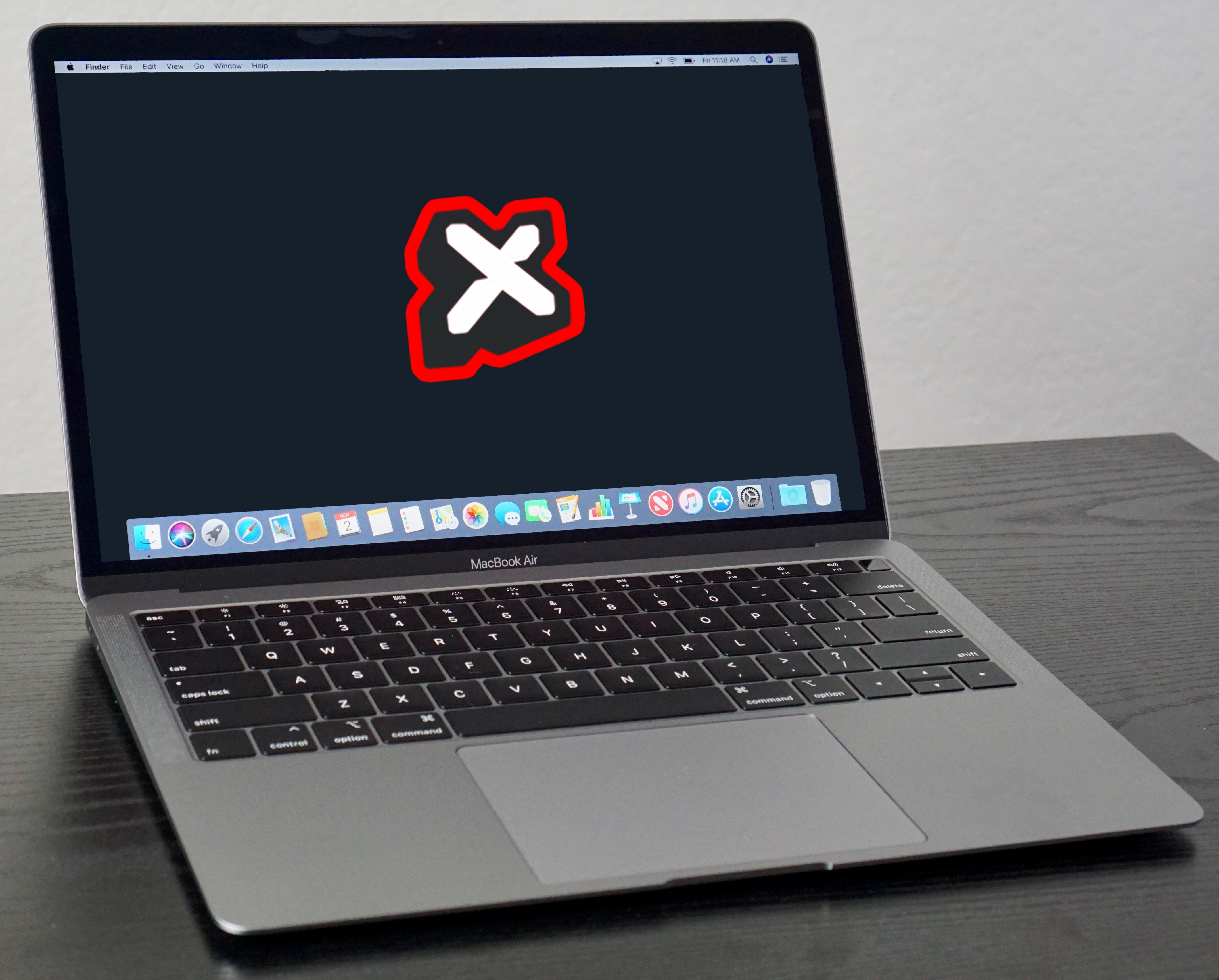 Ноўтбук MacBook Air з найлепшай шпалерай працоўнага стала